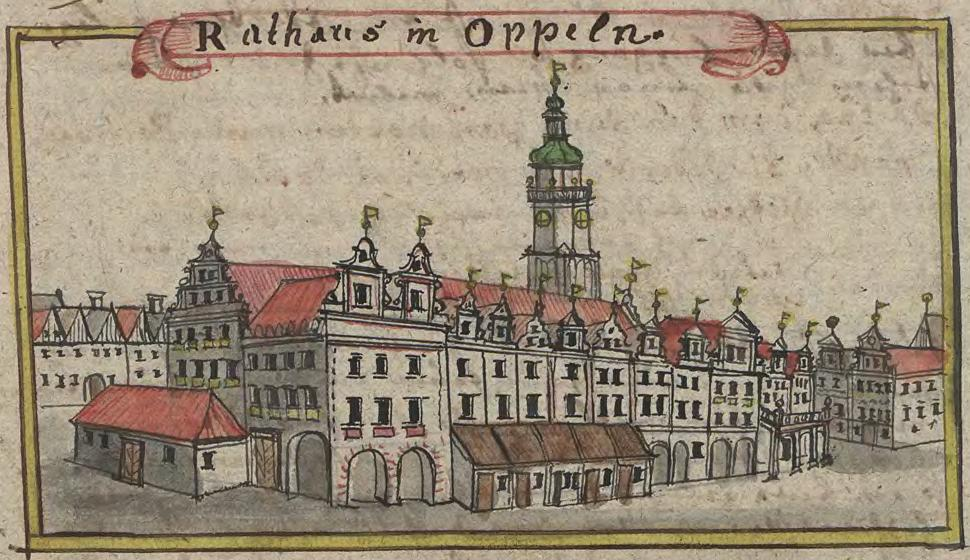 Das Rathaus in Oppeln mit angebauten Ringhäusern im 18. Jahrhundert. Zeichnung nach Friedrich Bernhard Werner.